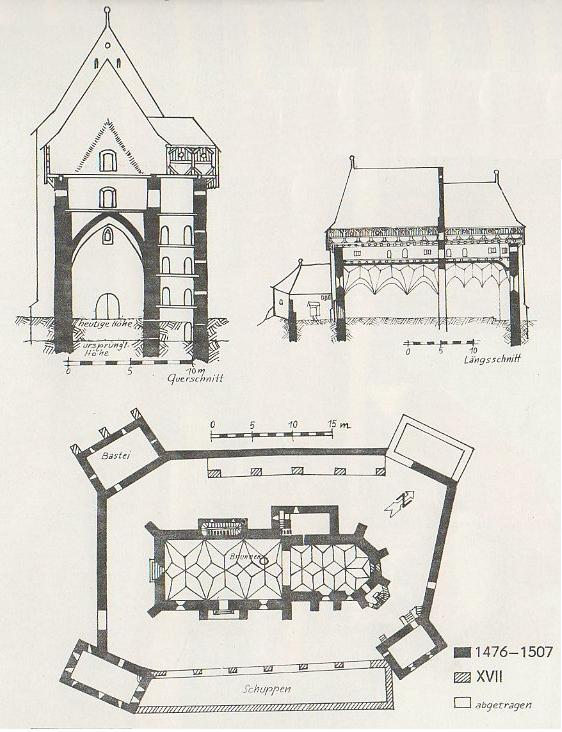 Planul fortificatiei din Bradeni.